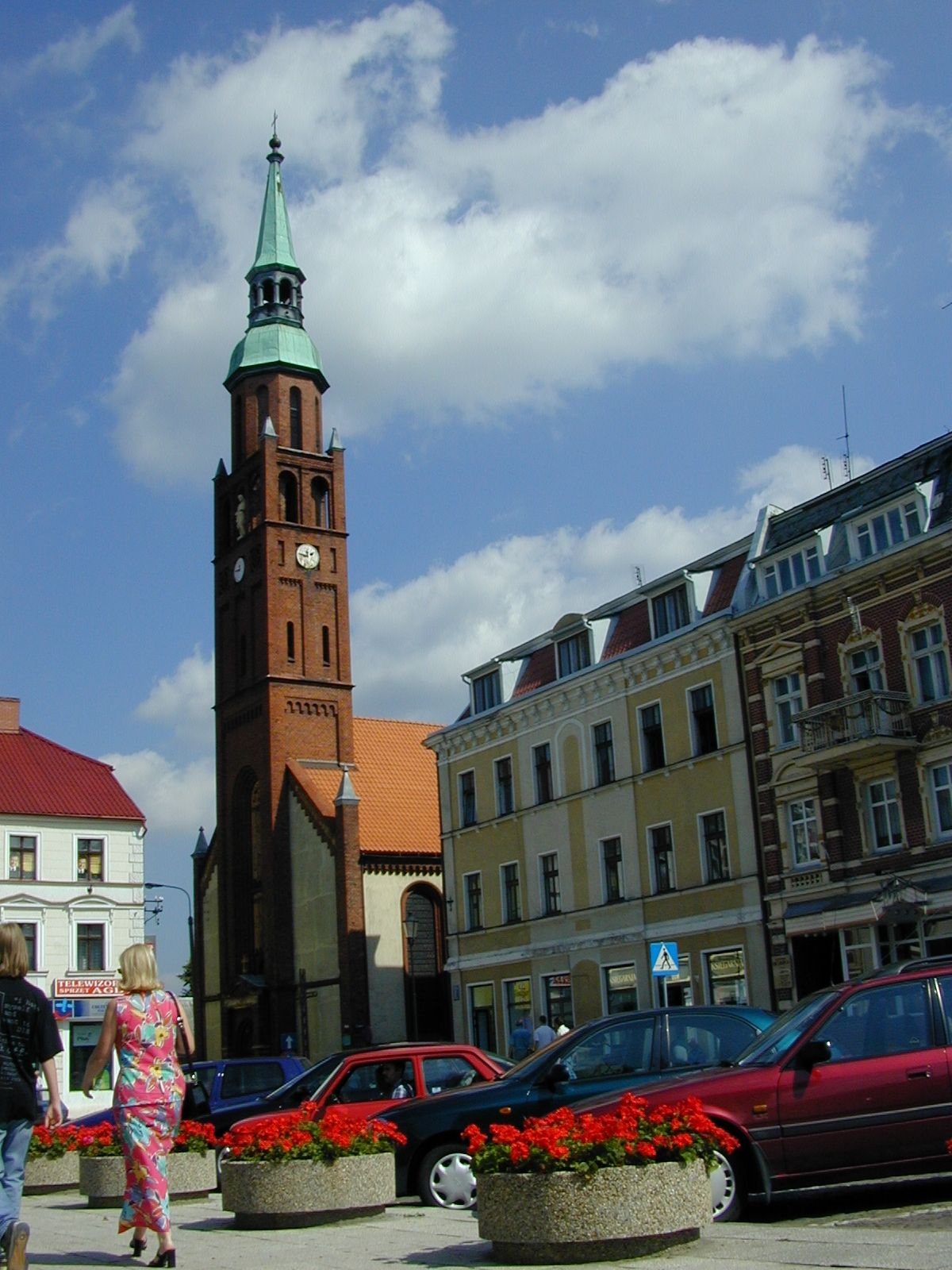 Rynek w Starogardzie.